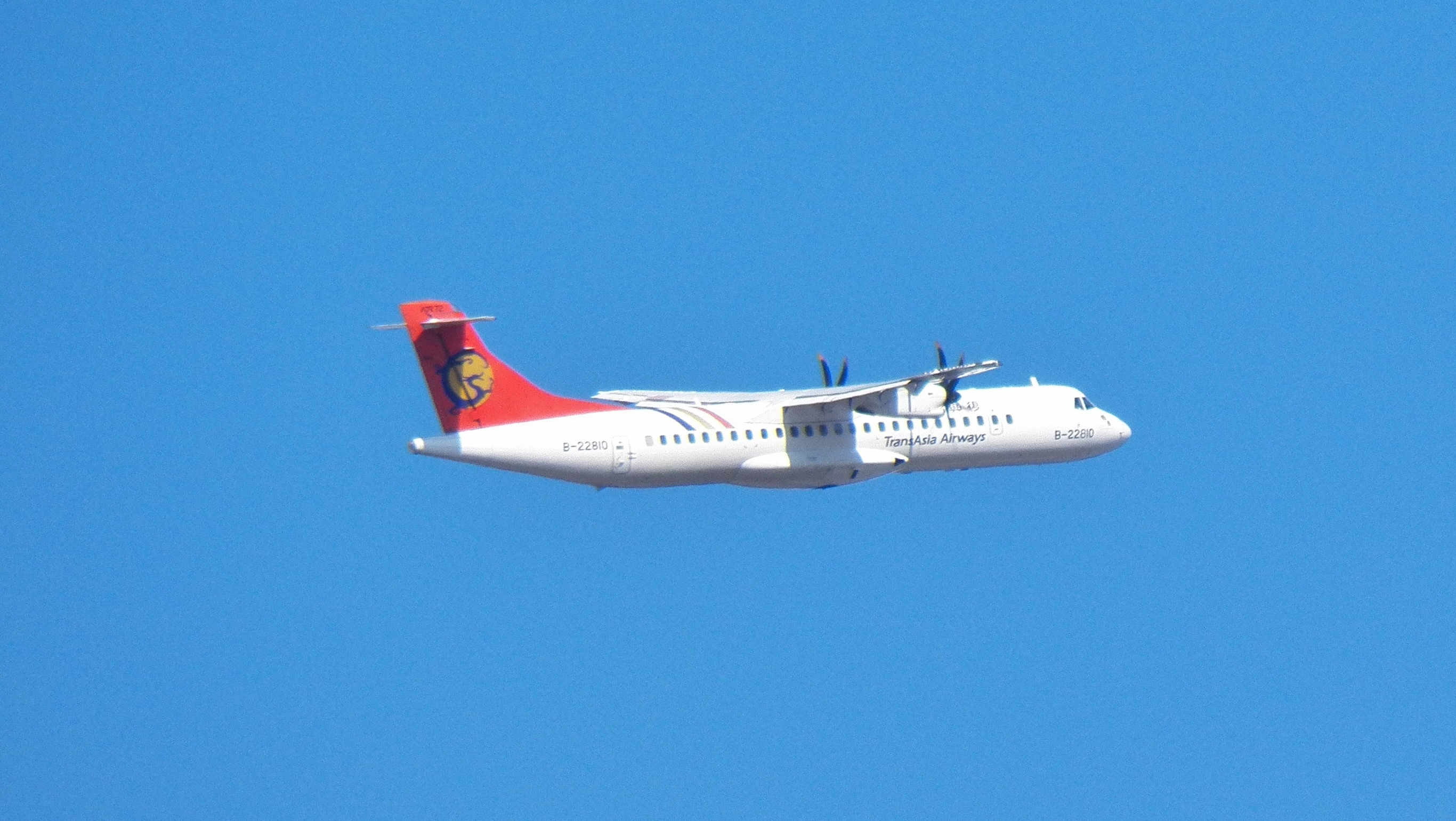 從臺北松山機場起飛的復興航空ATR 72-500 B-22810客機。